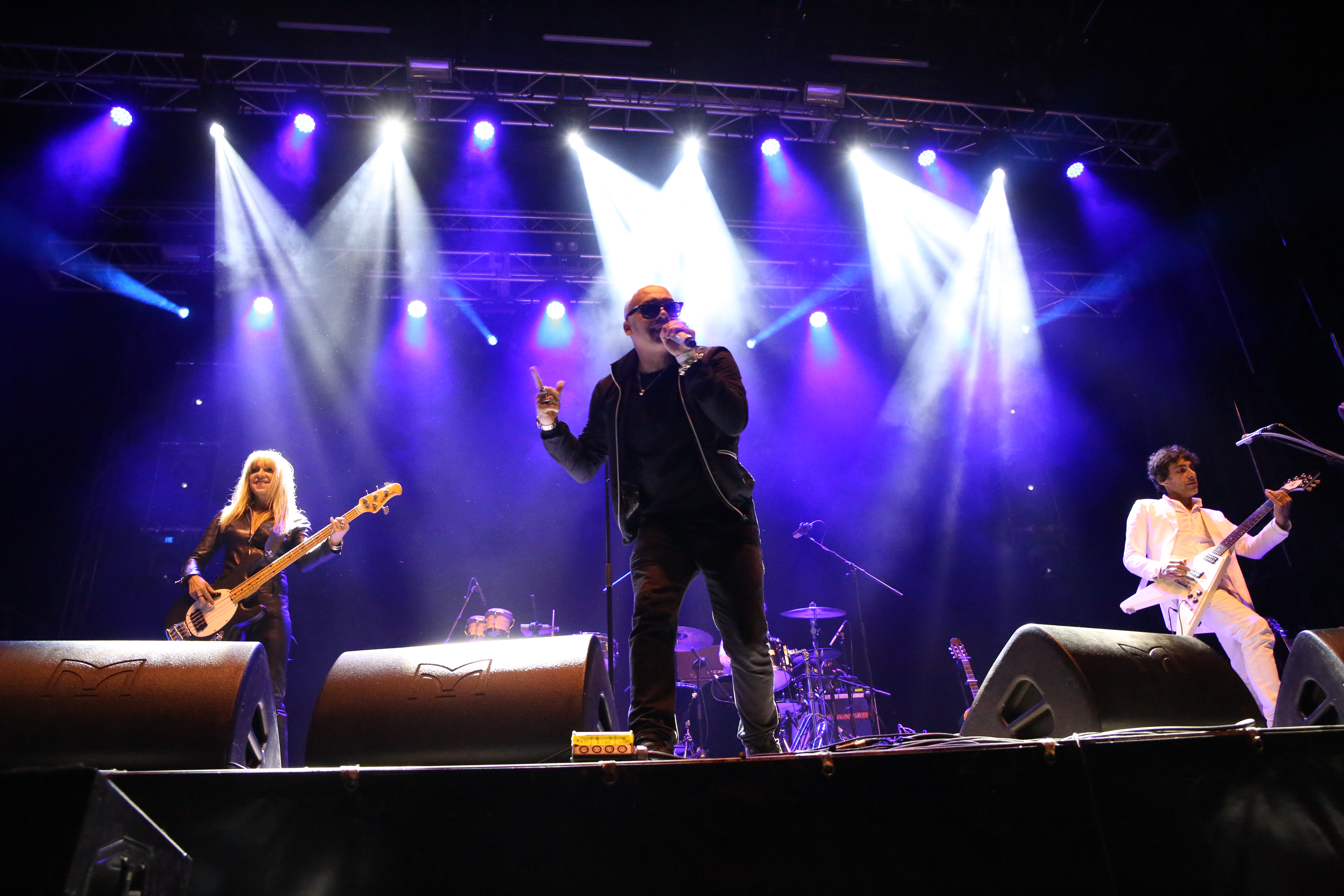 El grupo Rinôçérôse en el festival Palencia Sonora 2017.